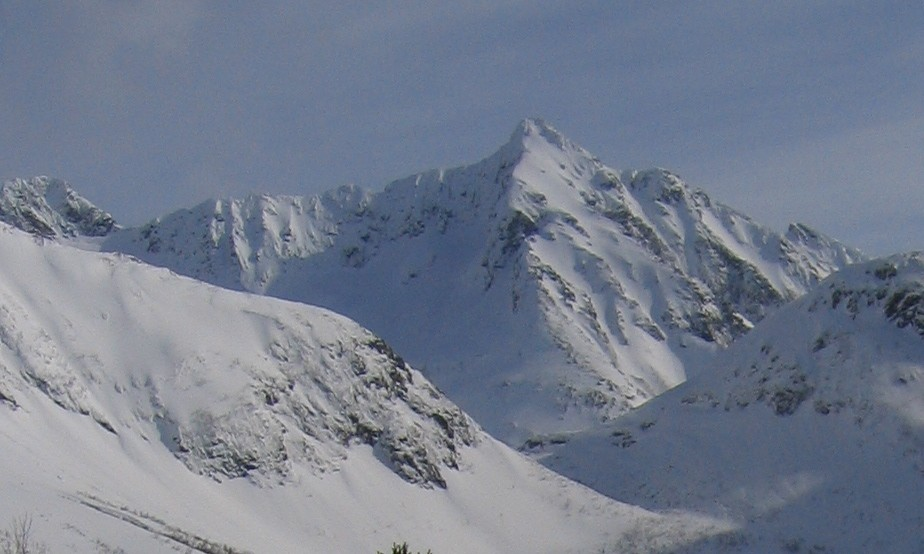 Kjerringa, Ørsta, Sunmøre, fotografert frå Vartdal, Årsetdalen